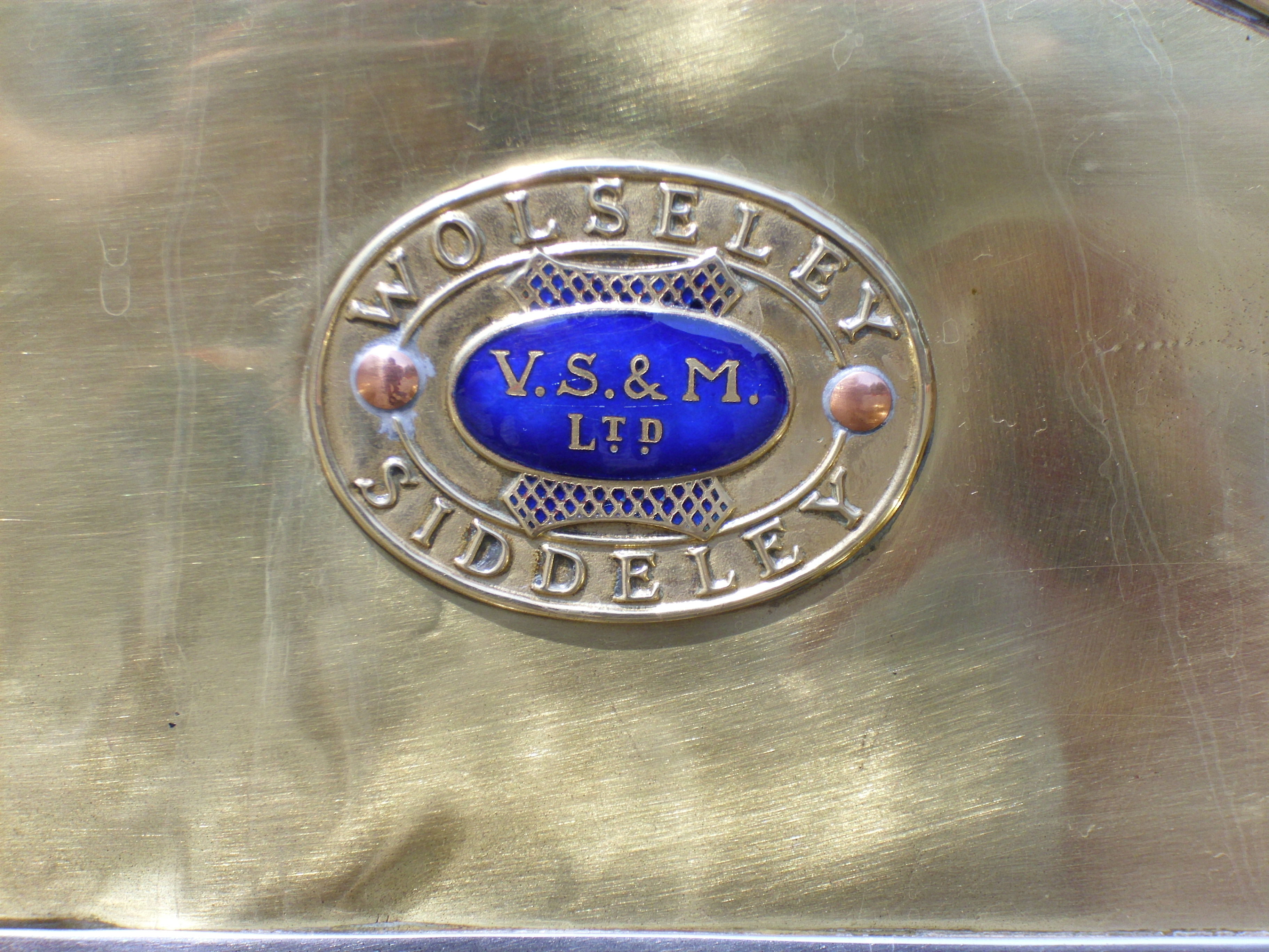 Emblem Wolseley-Siddeley